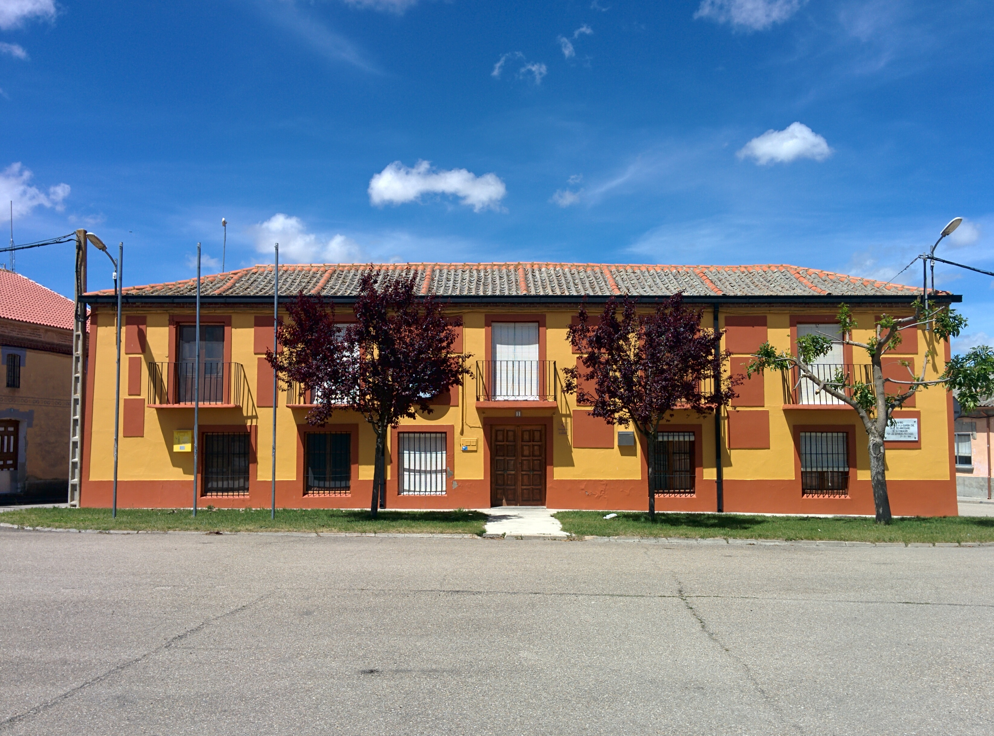 Casa consistorial de Ramiro (Valladolid, España).